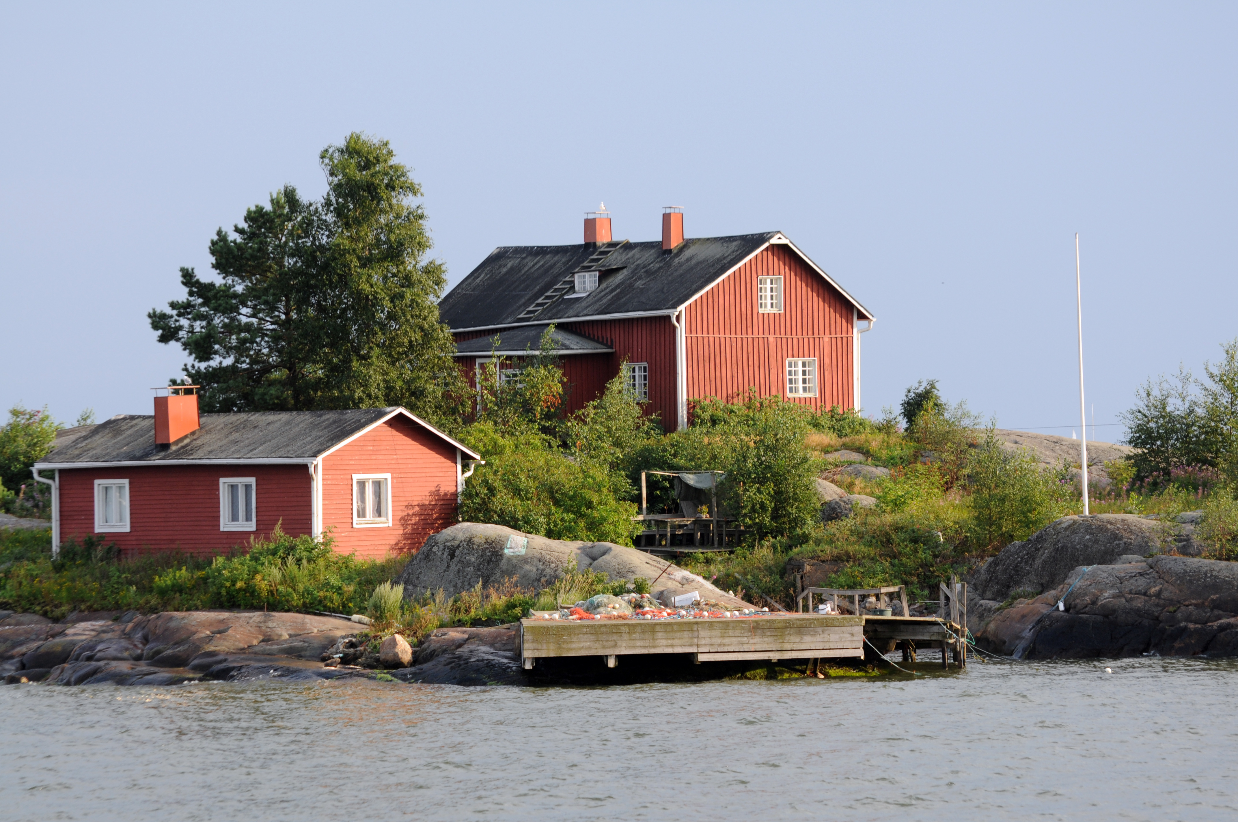 Helsinki